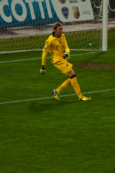 immagine del calciatore Vincenzo Fiorillo con la maglia del Livorno nella stagione 2012/2013